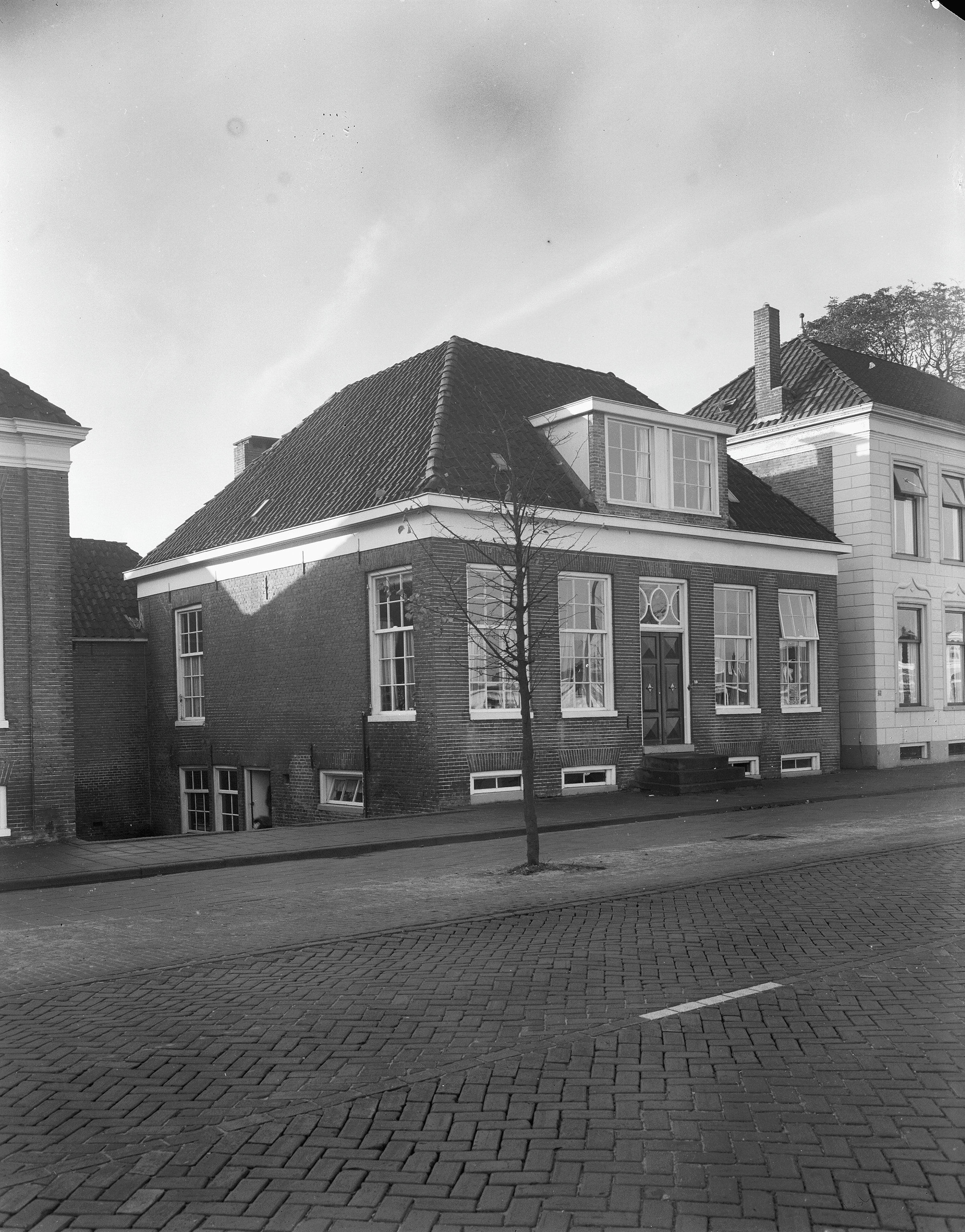 zuid-zijde